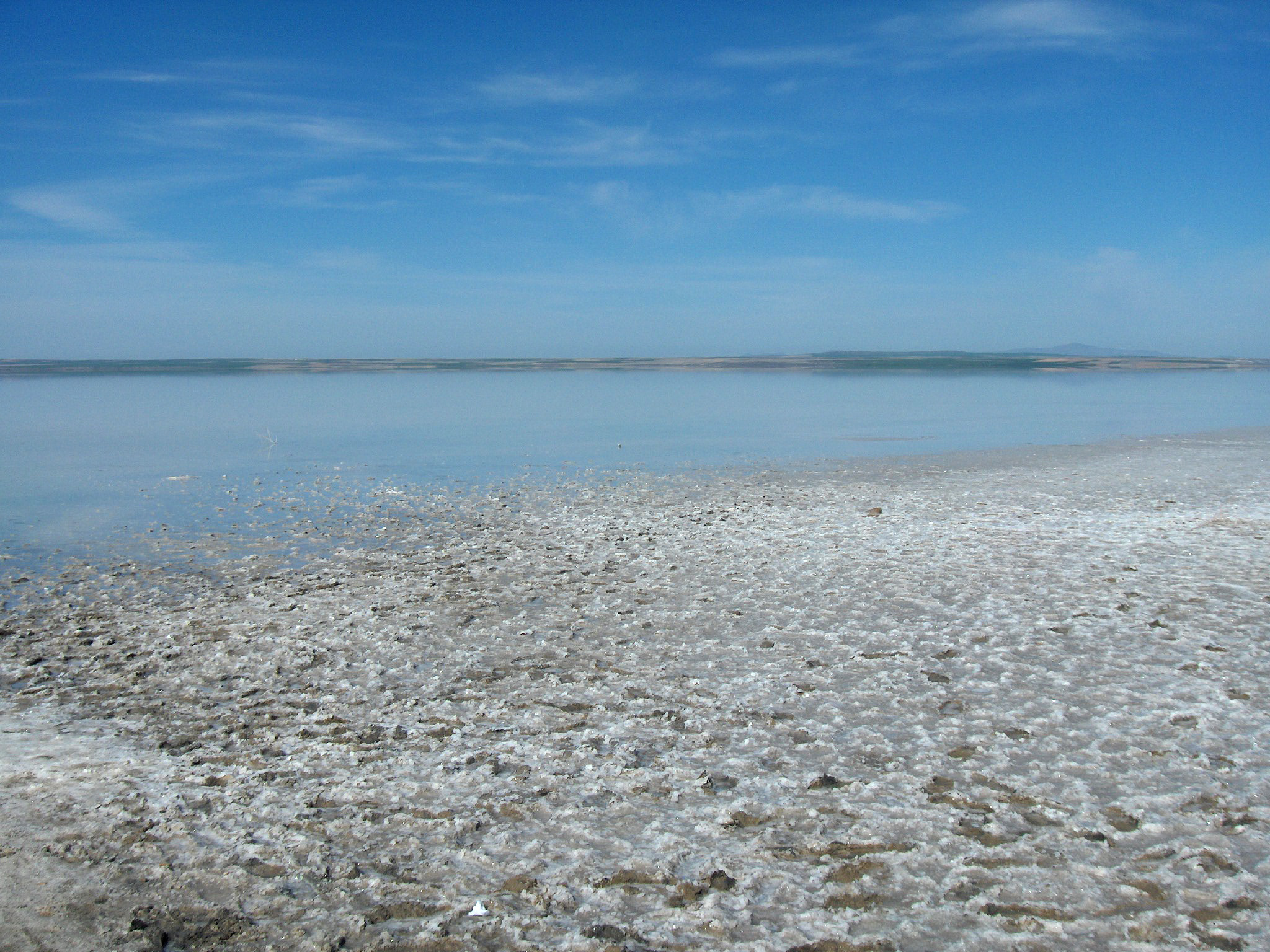 Lake Tuz, very large saline lake in Turkey